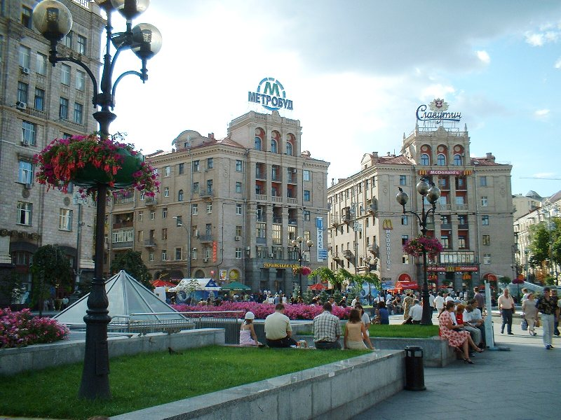 Ukrajina Kijev Priozor sa Trga Nezavisnosti